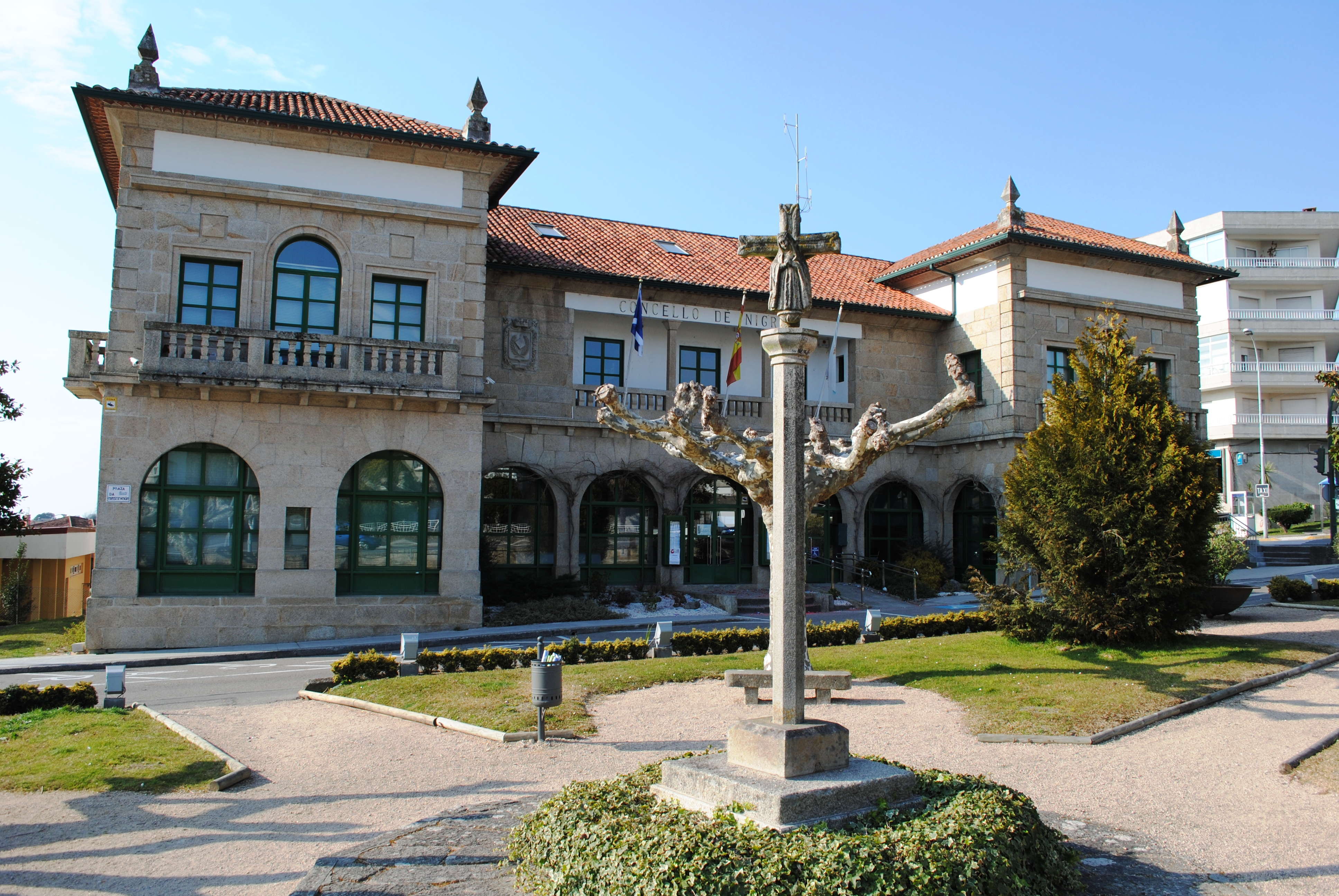 Casa do Concello de Nigrán, parte vella